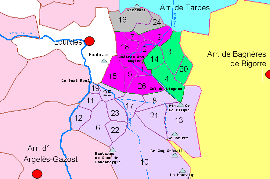 Carte du canton de Lourdes-Est. Les numéros renvoient aux noms des communes.